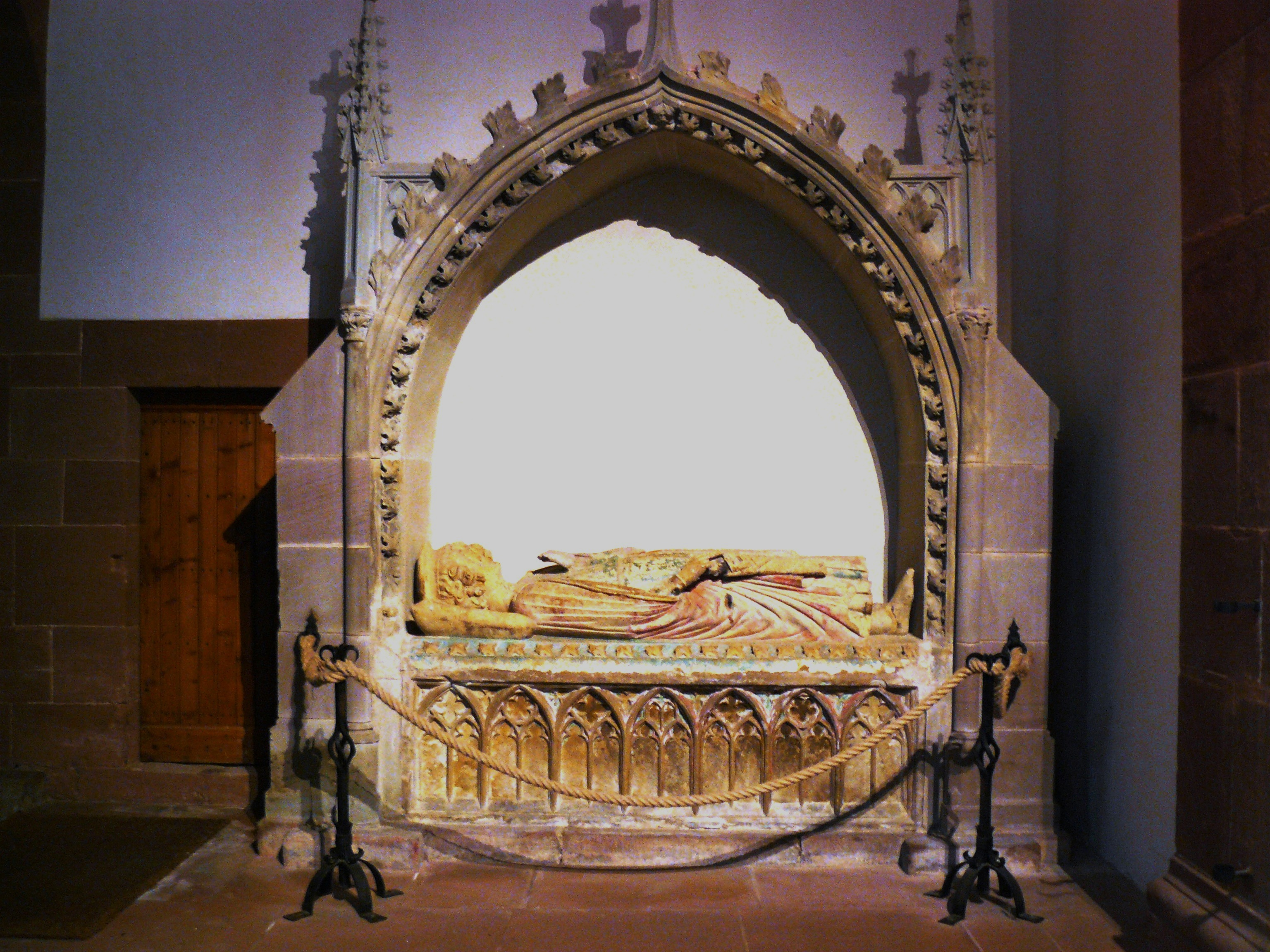 Gisant d'Eberhard fondateur de l'abbaye de Murbach au fond sud du transept ( XIIIe siècle)